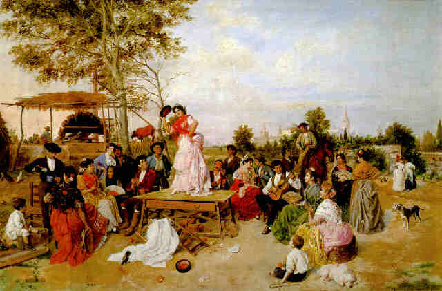 Fiesta en el cortijo, óleo sobre lienzo, 71 x 107 cm, Manuel Cabral Aguado Bejarano (1889).